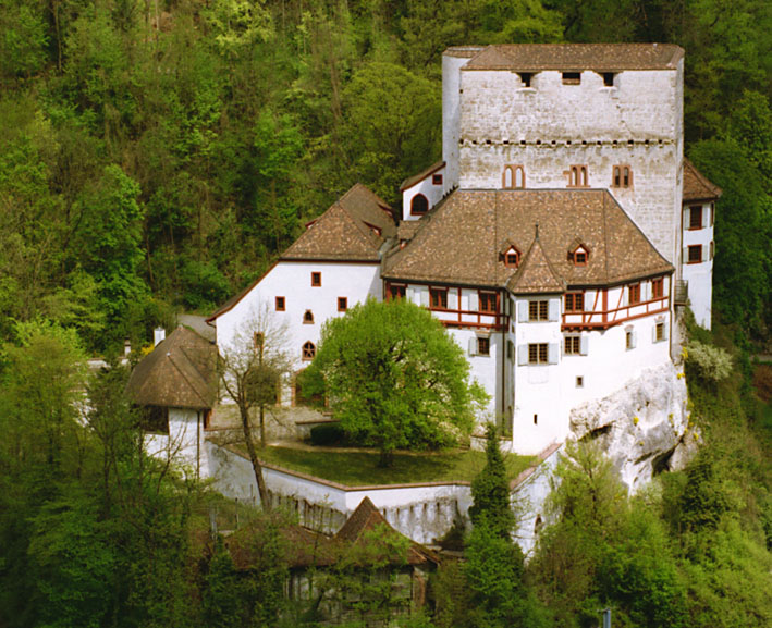 Schloss Angenstein,Uebericht ueber den Schlosskomplex